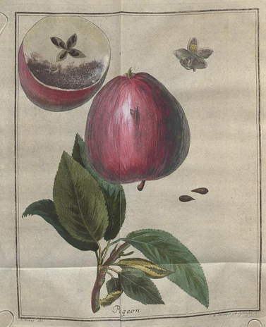 Apfelsorte Pigeon aus einem Buch von Samuel David Ludwig Henne